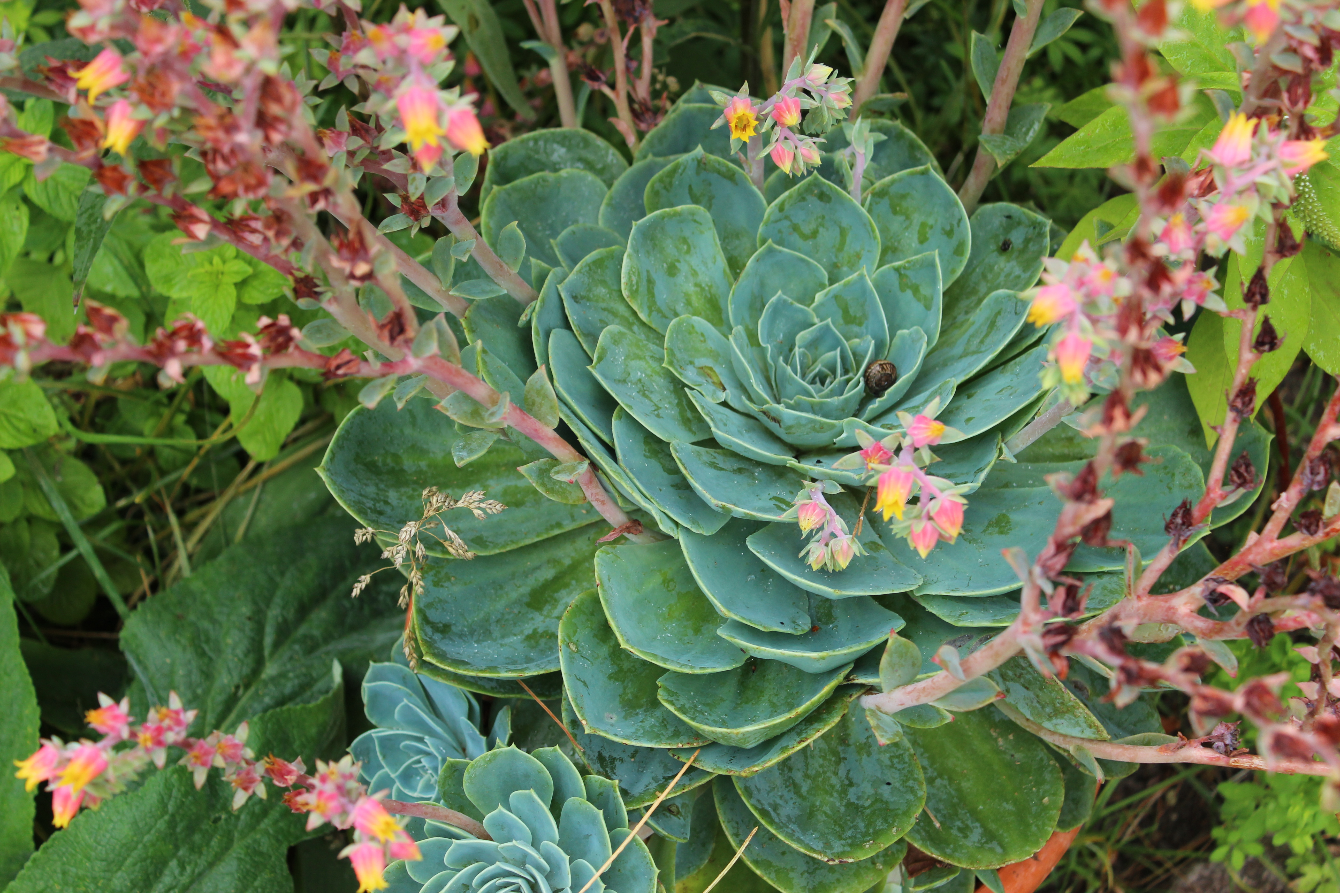 Stamm einer Echeveria pumila